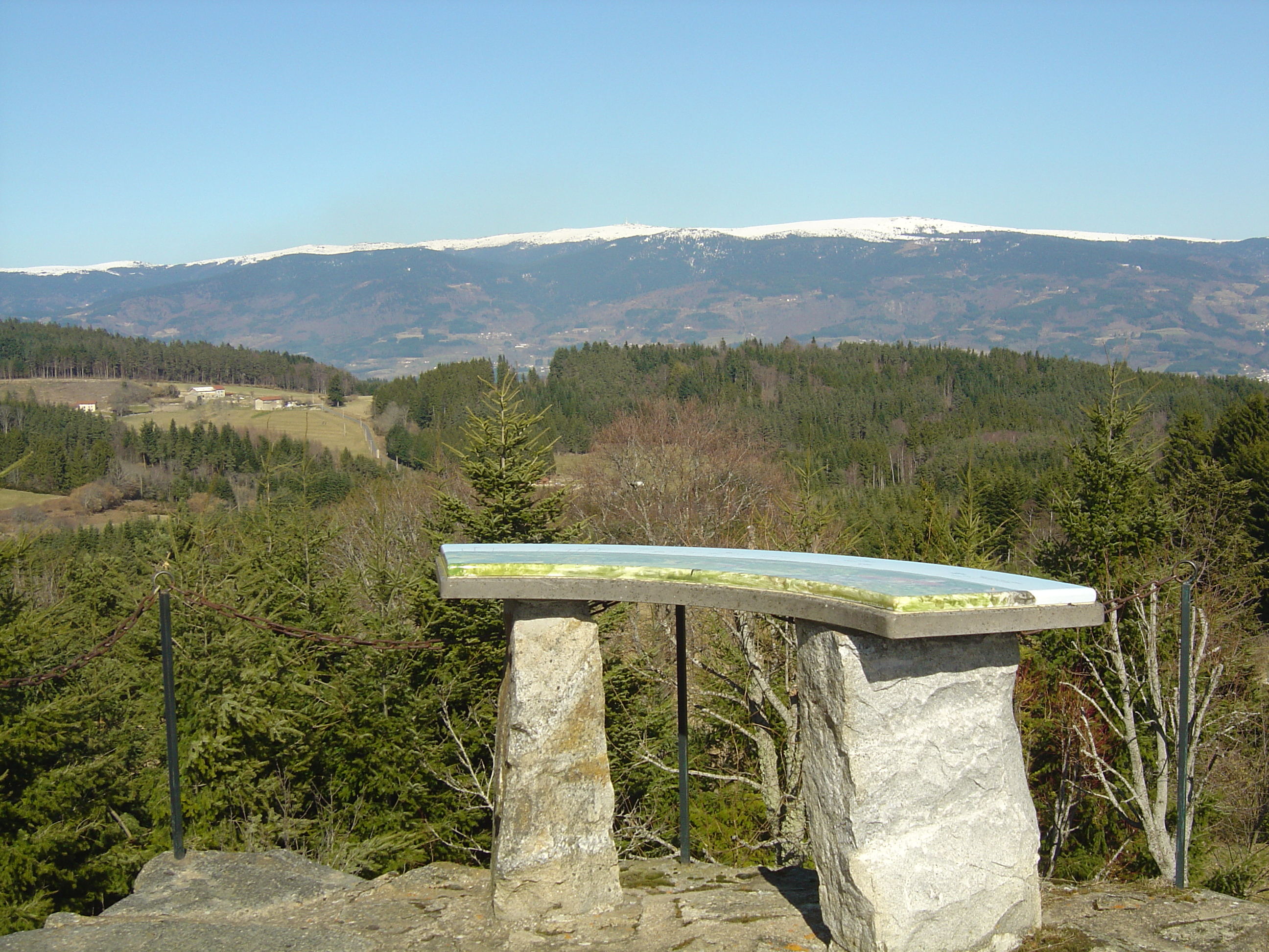 Vue depuis le rocher de la Vierge sur Pierre-sur-Haute et les monts du Forez Le Monestier (63)